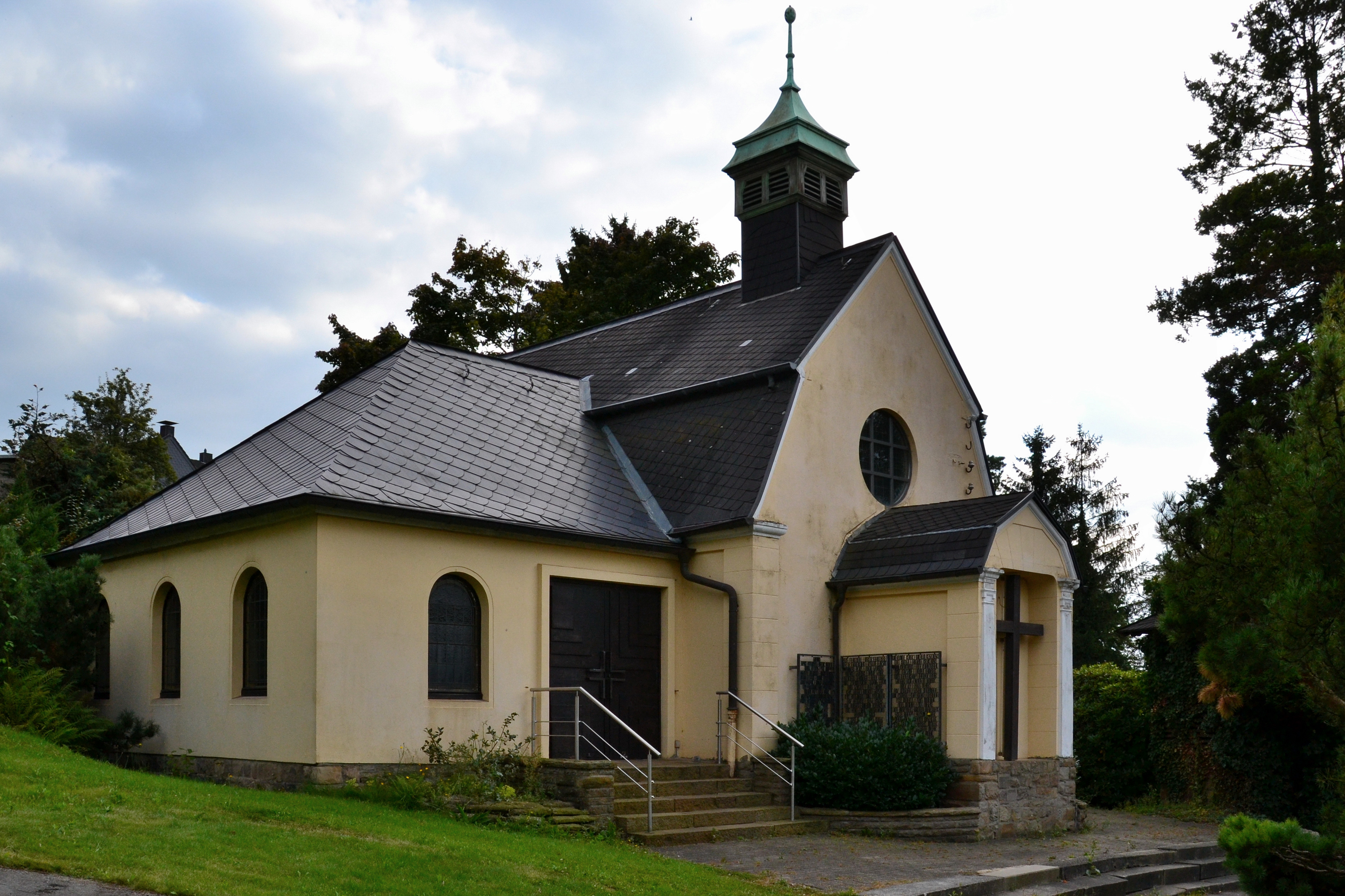 Kappele des evangelische Friedhofs Essen-Kupferdreh, unter Denkmalschutz